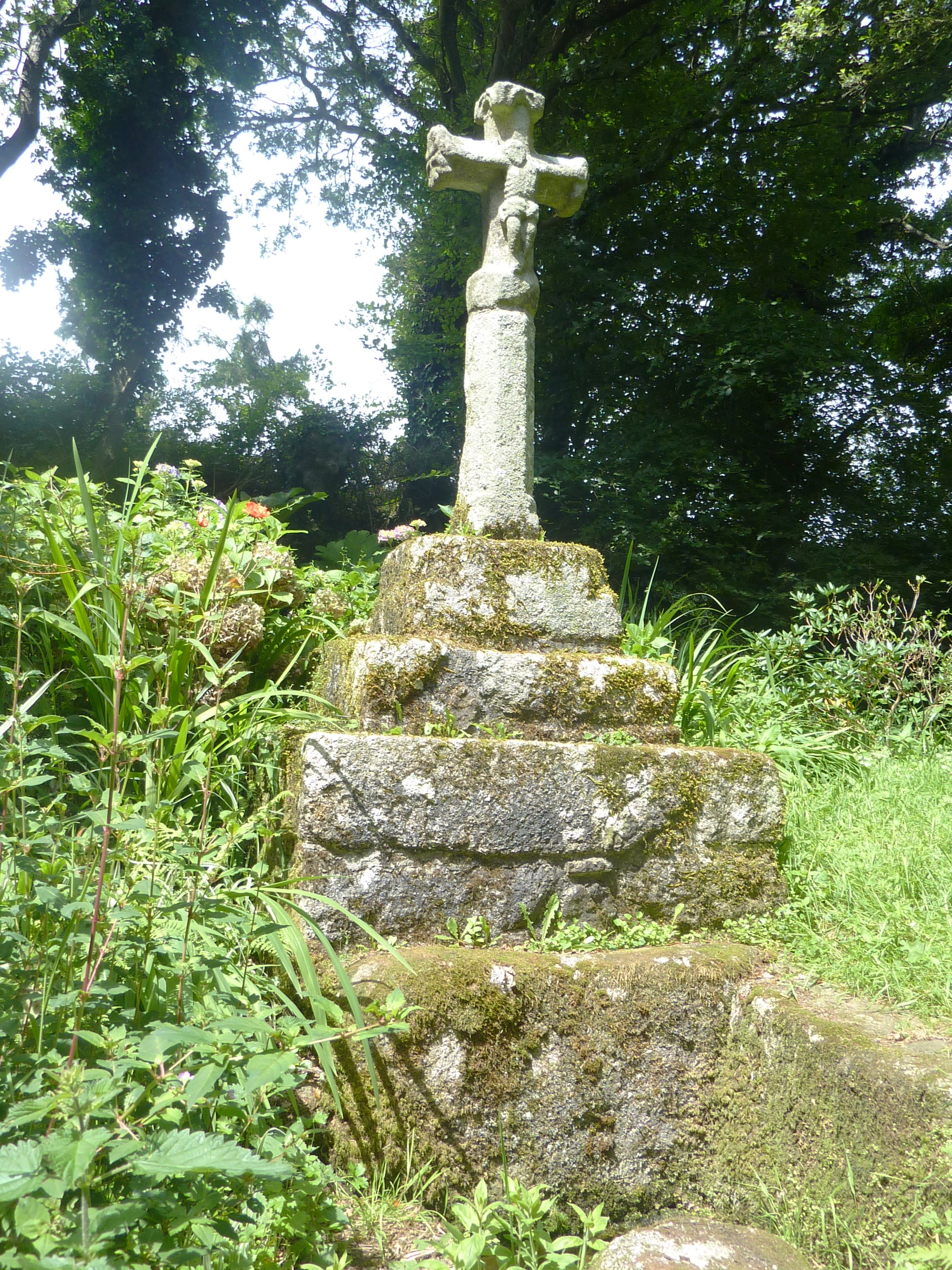 Ploudaniel : le calvaire de Kermoalic (XVe siècle) vu de près